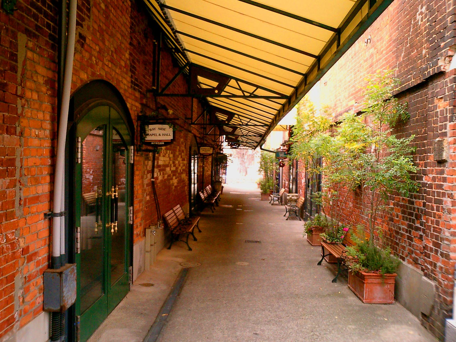 Renga-soko-resutorangai Kobe_Harbor_Land